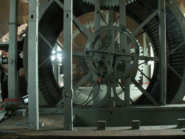 Het carillon in de toren van de St. Laurenskerk speelt elk kwartier een melodietje, zoals dat op de grote speeldoos is genoteerd. Gezien van opzij Categorie:Afbeelding Rotterdam